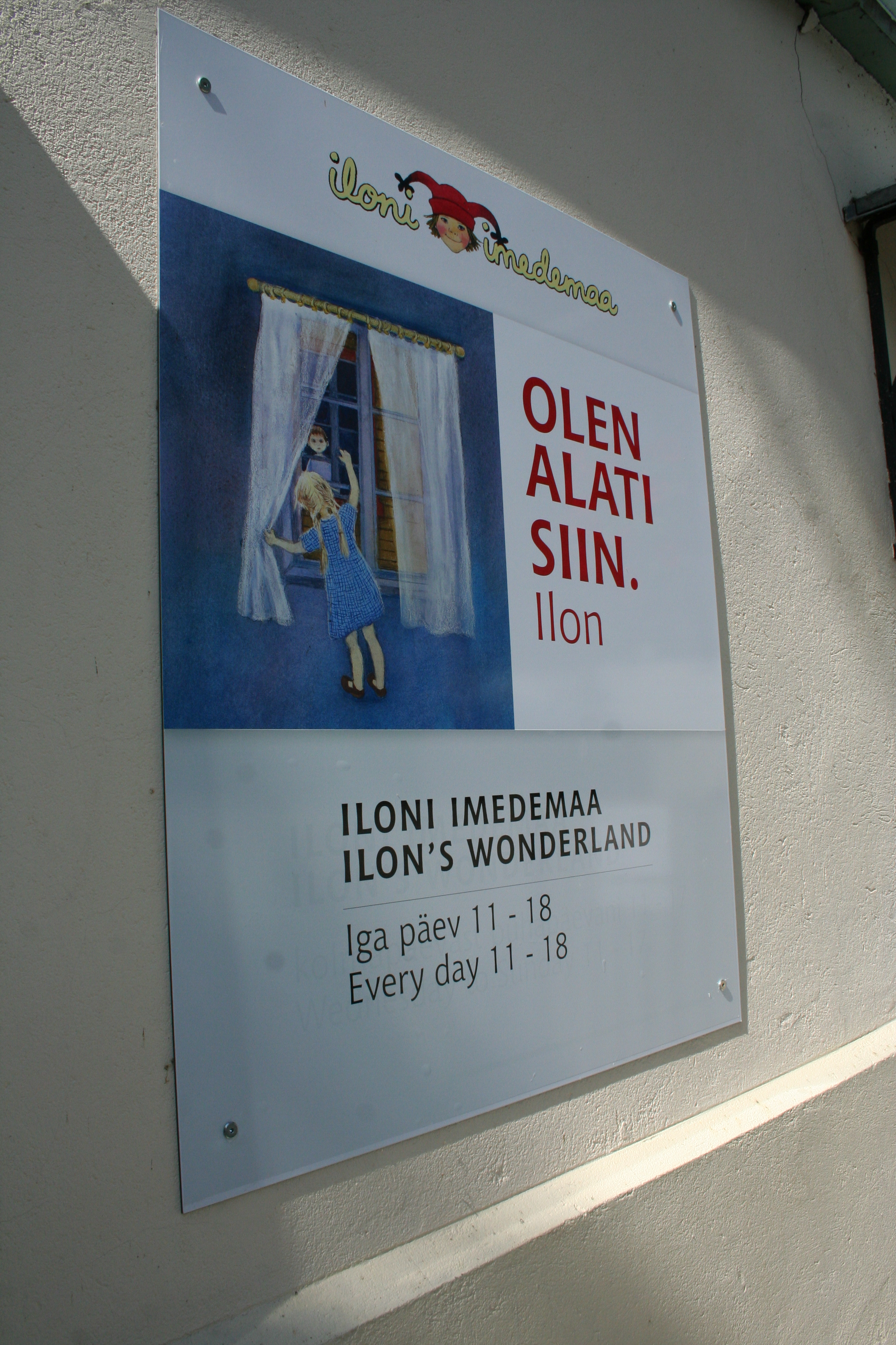 Iloni Imdemaa silt 2015